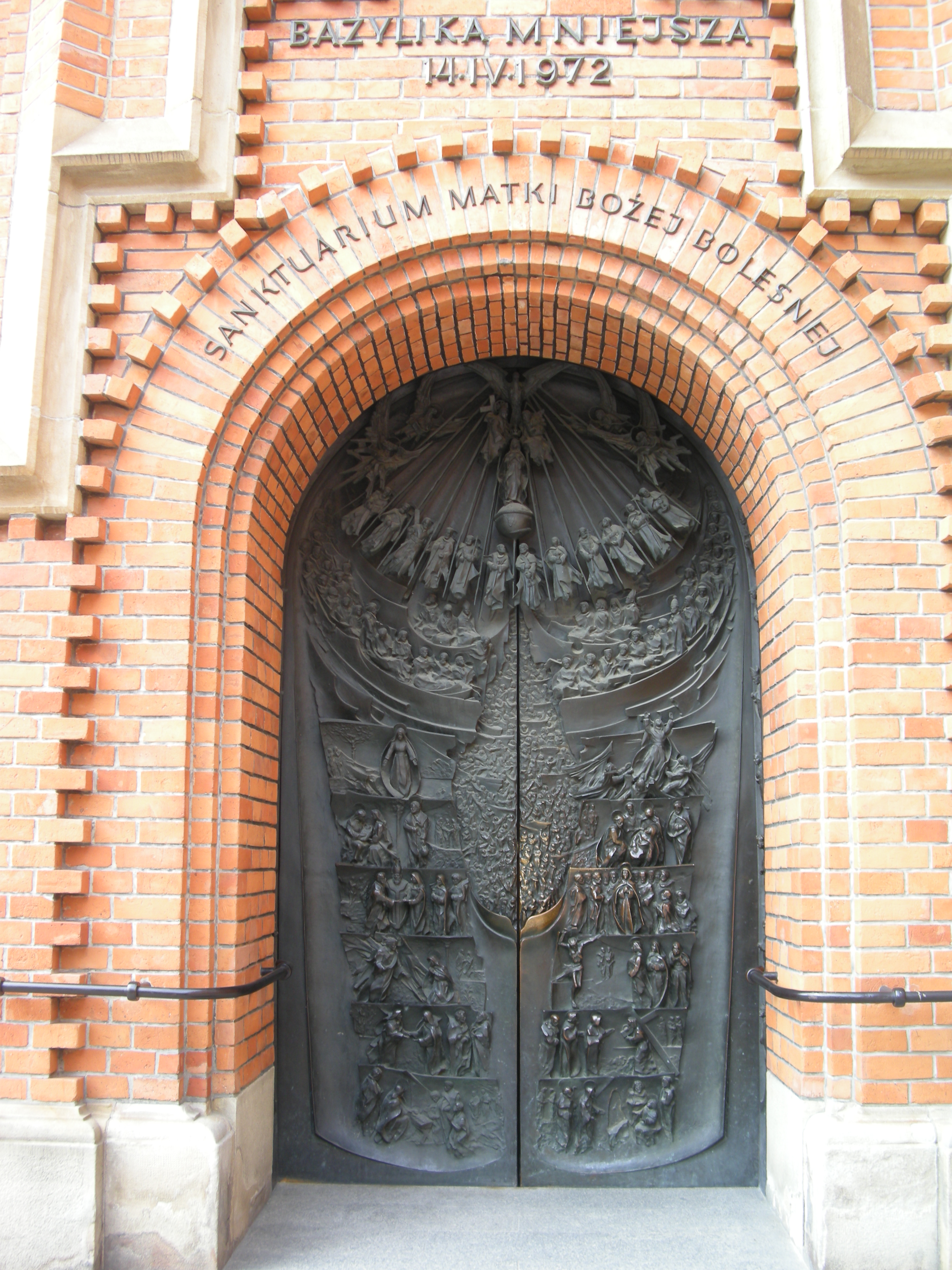 Drzwi od strony południowej ze scenami z życia Maryi